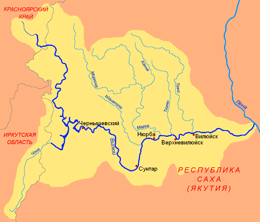 Схема бассейна реки Вилюй